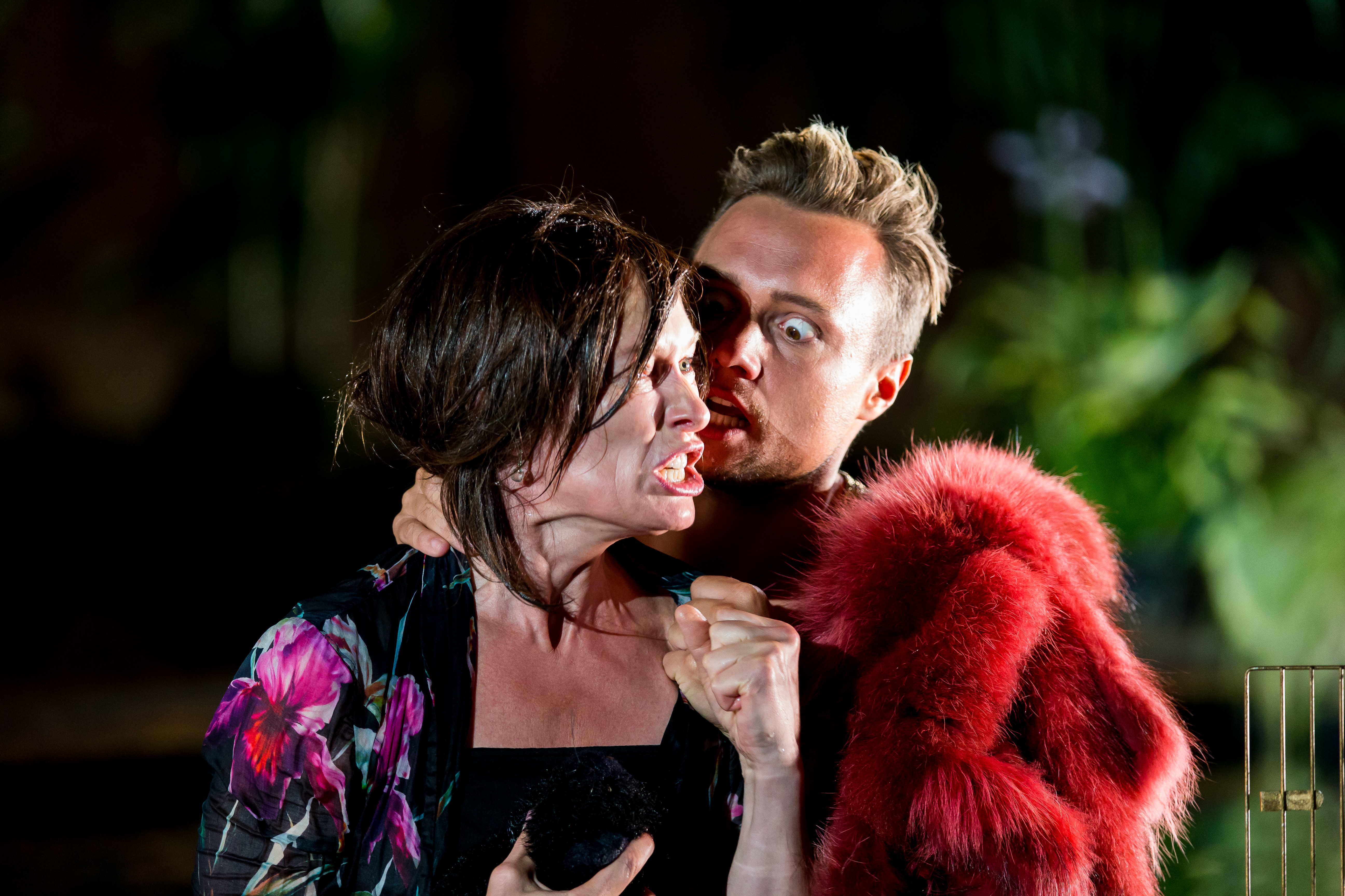 2016: Uraufführung: "GOLD. Der Film der Nibelungen" Regie: Nuran David Calis Autor: Albert Ostermaier Intendant: Nico Hofmann --- Ensemble: Produzent Konstantin Trauer: Uwe Ochsenknecht Regisseur Arsenij Kubik: Vladimir Burlakov Drehbuchautor Charlie P. Weide: Josef Ostendorf Society Reporter Peter Scheumer: Dominic Raacke Kamerafrau "the eye": Anna Rot Setdesignerin "set": Joy Maria Bai Assistentin des Produzenten Carmen: Alexandra Kamp Maskenbildnerin Sueyla Blume : Ayse Bosse die Ältere Kriemhild Karina Bergmann: Katja Weitzenböck die Jüngere Kriemhild Simone Gehel: Constanze Wächter die Ältere Brünhild Lotte Jünger: Michaela Steiger die Jüngere Brünhild Nathalie Aurun: Dennenesch Zoudé Siegfried Mohamad Söder: Ismail Deniz Hagen René Inner: Sascha Göpel Gunther Klaus Castel: Maximilian Laprell Bürgermeister Franz Koppoler: Heiner Lauterbach during Nibelungenfestspiele "GOLD. Der Film der Nibelungen" at Wormser Kaiserdom, Worms, Rheinland Pfalz, Germany on 2016-07-12, Photo: Sven Mandel